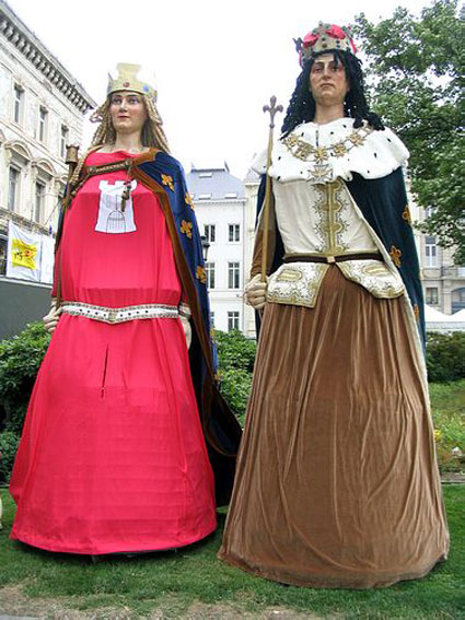 eigen foto, stoet in brussel, 21 juli. geen auteursrechten aangaande reuzen